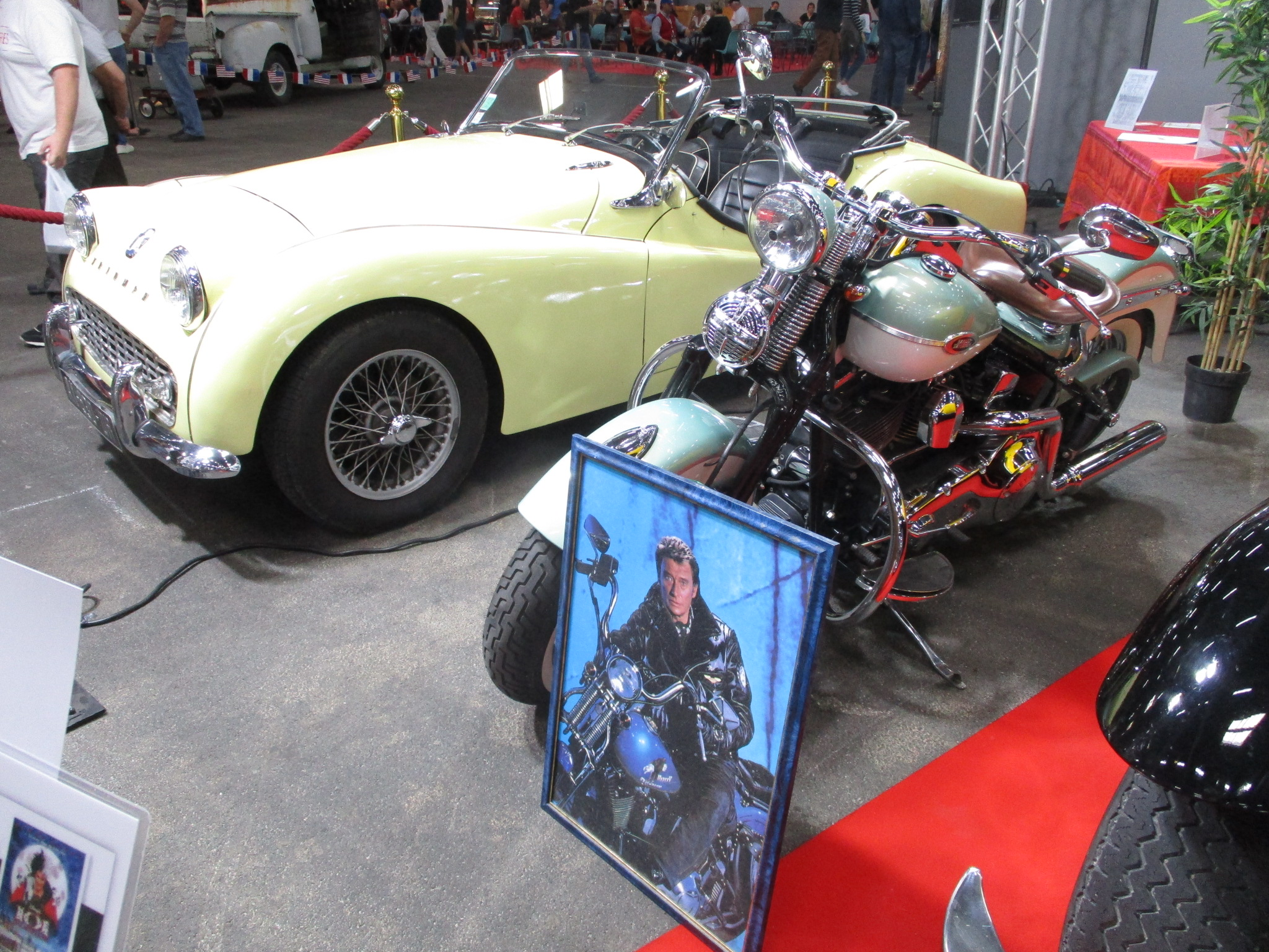 Triumph TR3A & Harley-Davidson - Salon Rétromobile de Besançon 2019 (stand d'exposition Johnny Hallyday)